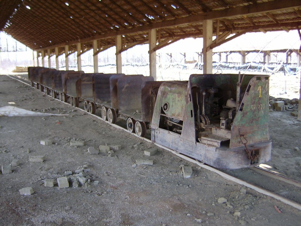 A békési téglagyári vasút motoros vontatója (kulija).